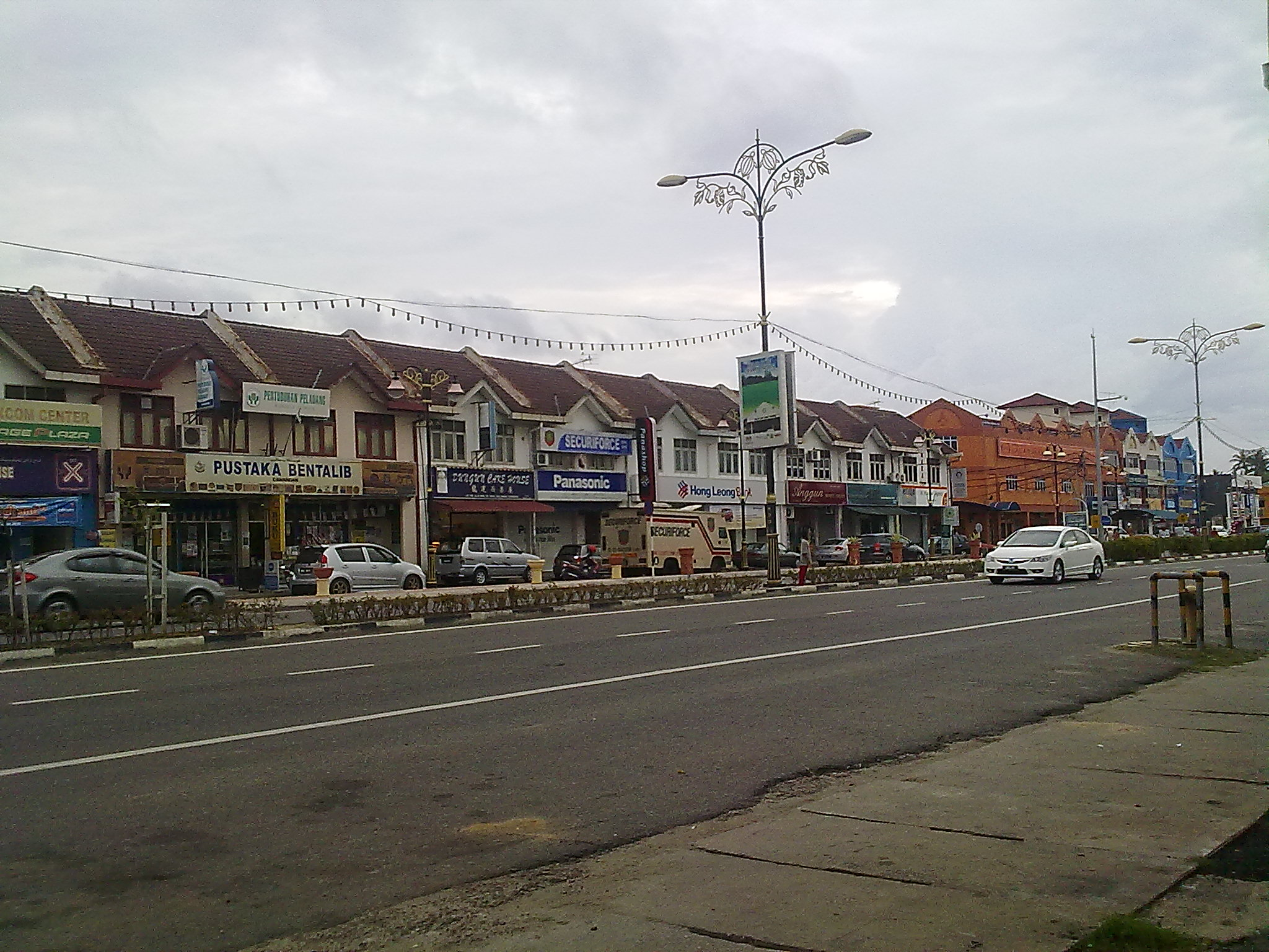 Dungun